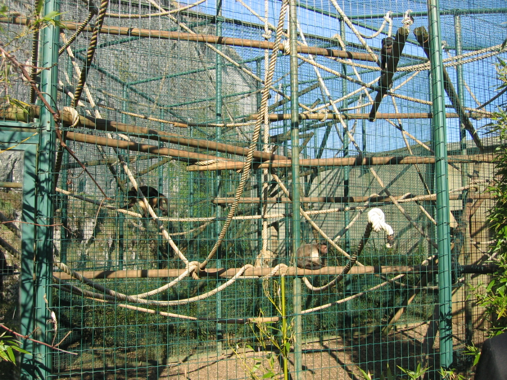 Citadelle de Besançon